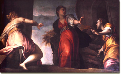 Sante Peranda, Psiche respinta da Cerere e da Giunone